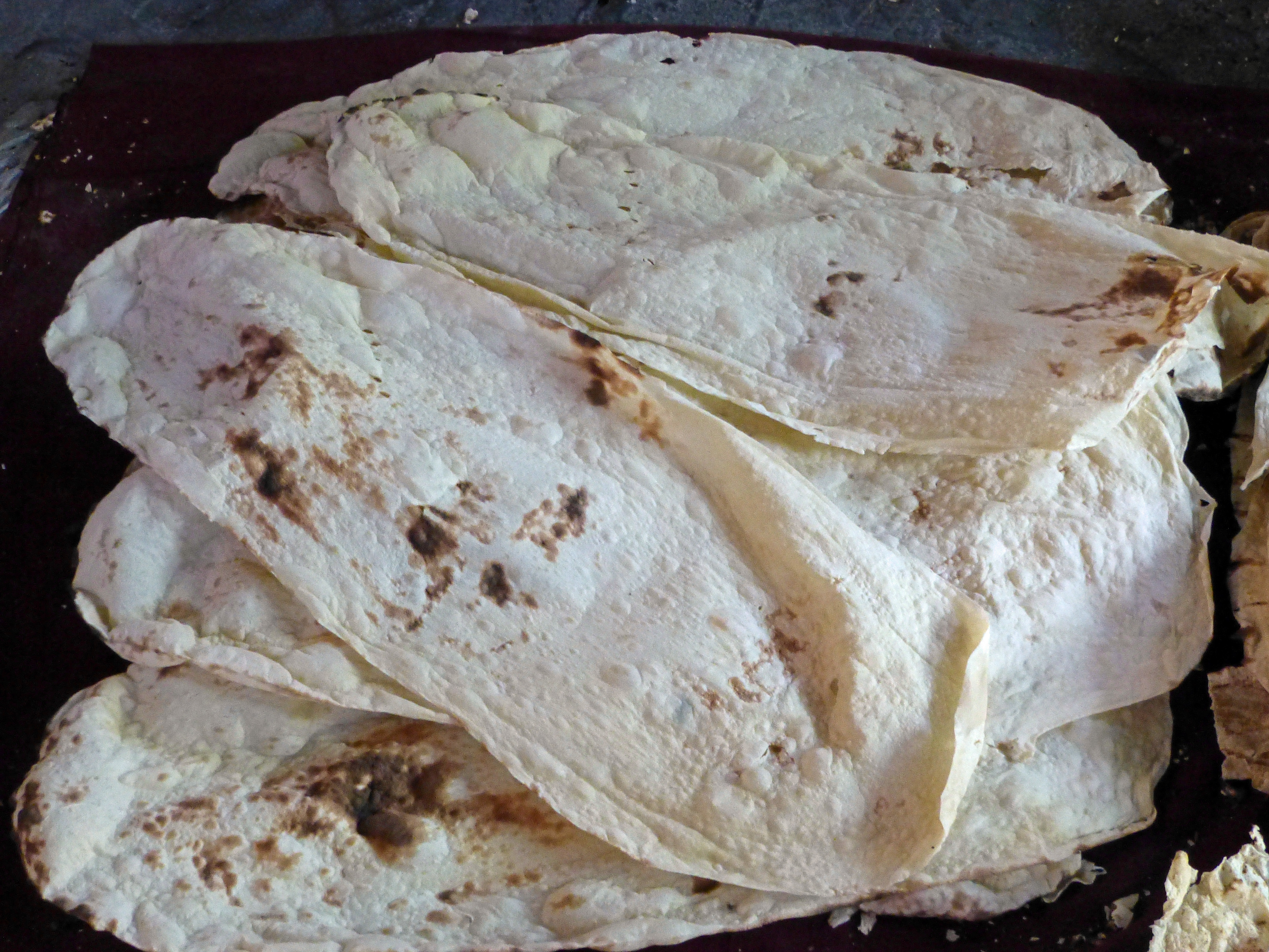 Fabrication du lavash à proximité du monastère de Noravank (Arménie).